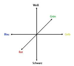 Farbraum nach der Gegenfarbentheorie